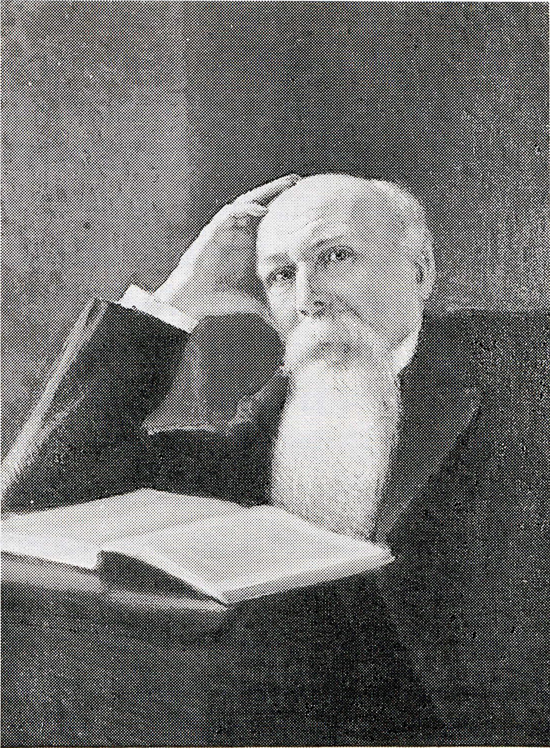 Venäjän kielen ja kirjallisuuden professori Josef Mandelstam (1846–1911) kuolemansa jälkeen valmistuneessa muotokuvassa.